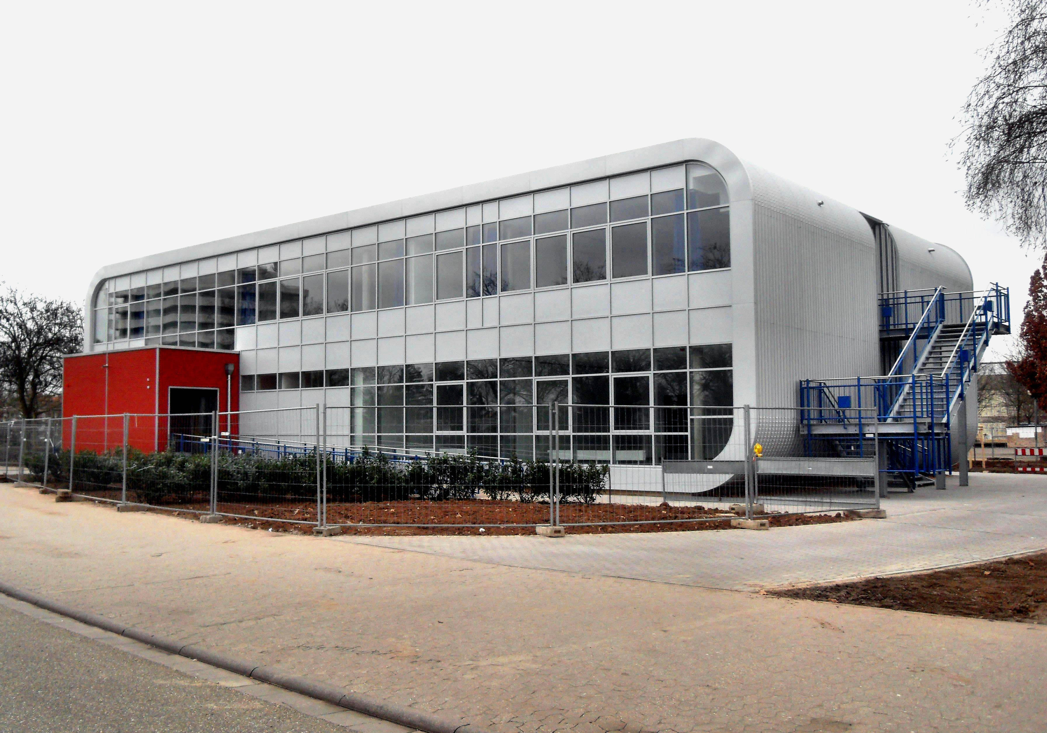 Das Mensagebäude des Wormser Rudi-Stephan-Gymnasiums in Rheinland-Pfalz (Deutschland)